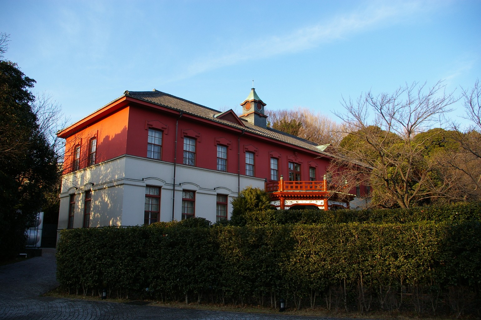 東京大学総合研究博物館小石川分館